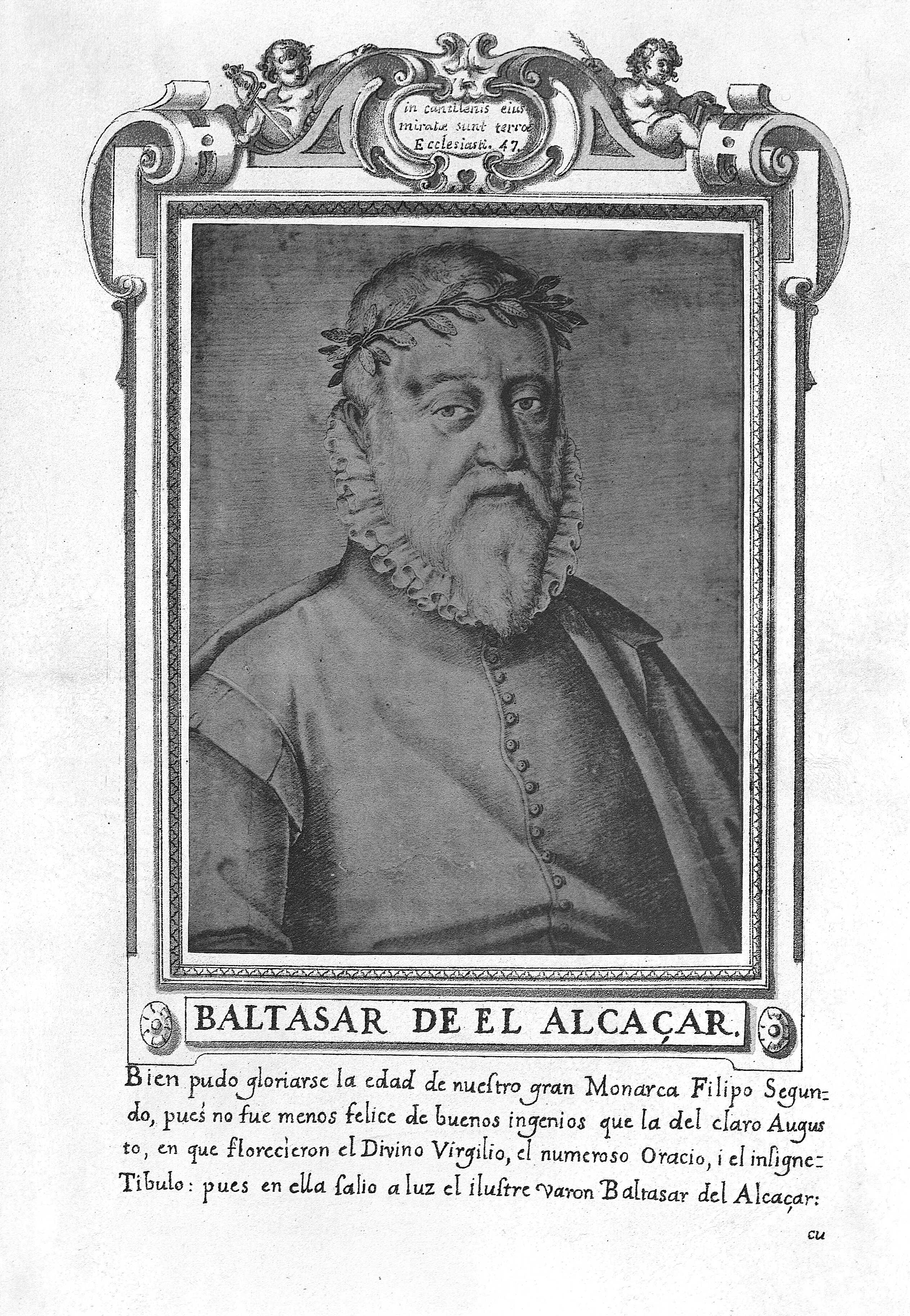 Baltasar del Alcázar en Francisco Pacheco, (1564-1644) El libro de descripción de verdaderos retratos, ilustres y memorables varones, [Sevilla, s.n., s.a.]- Real Academia de la Historia (Madrid). Signatura: 1/736